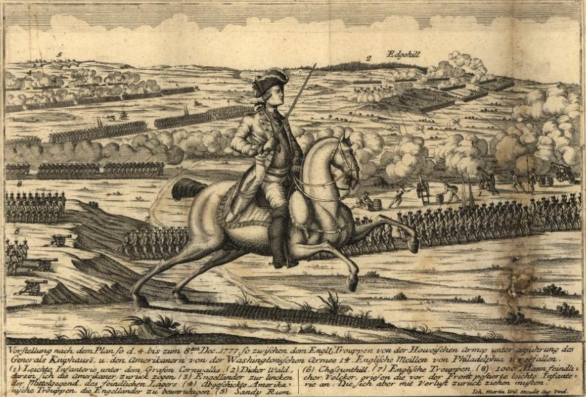 View from the British positions at the Battle of White Marsh. Chestnut Hill is in the lower left of the image, Sandy Run in the upper left, and Edge Hill in the upper right. Vorstellung nach dem Plan so d. 4. bis zum 8ten Dec. 1777 so zwischen dem Engl. Trouppen von der Howeischen Armee unter Anführung des Generals Kniphausē u. den Amerikanern von der Washingtonischen Armee 14 englische Meilen von Philadelphia vergefallen...